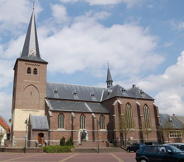 Foto is door de gebruiker zelf gemaakt.